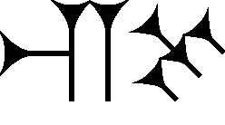 Cuneiform sign